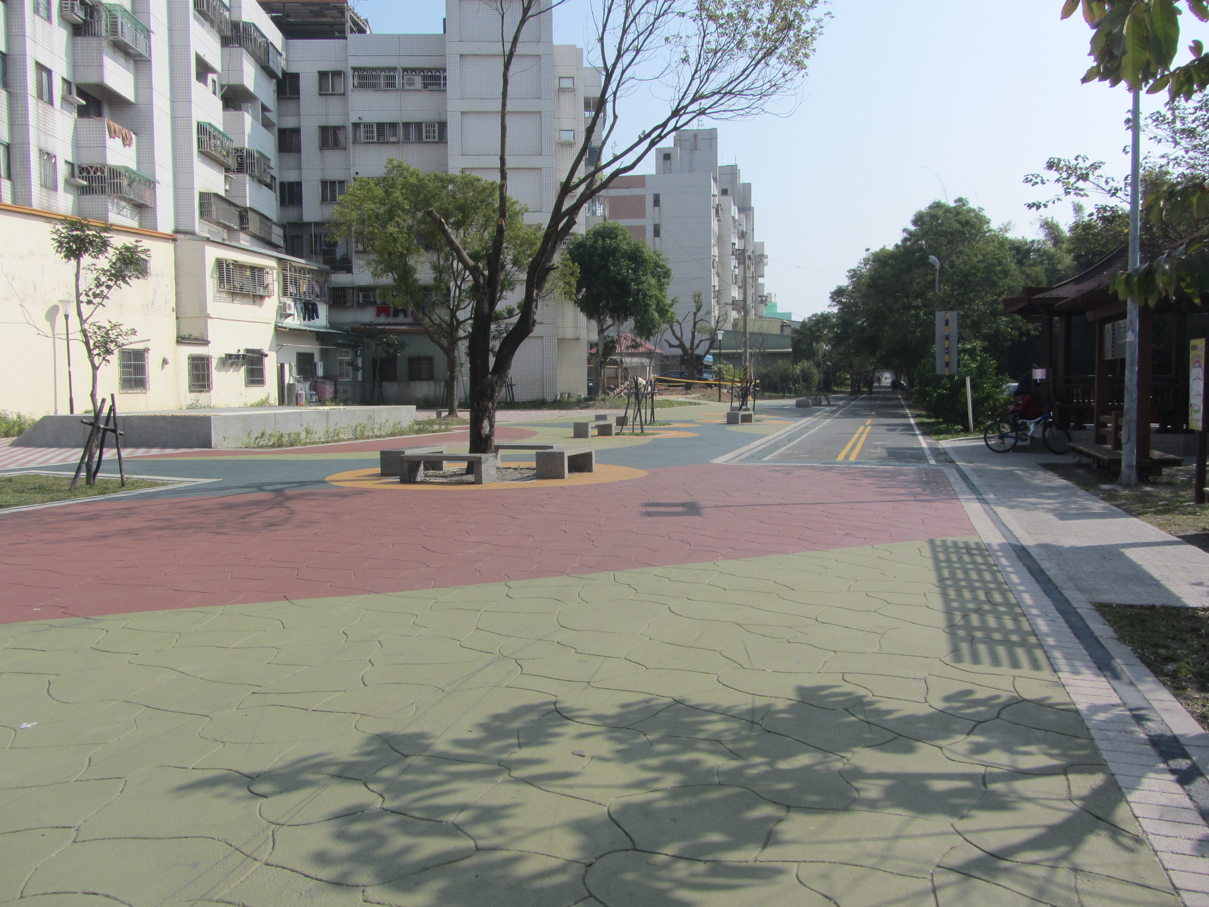 2014年1月的神岡線社口號誌站站場現況